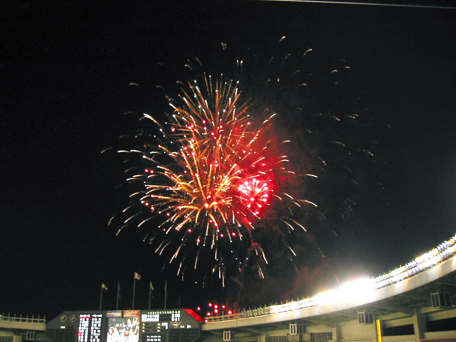 撮影者：投稿者と同じ 撮影場所：千葉県千葉市マリンスタジアム 2007年10月28日 (日) 22:33 . . Tohomar . . 1600×1200 (261 キロバイト)